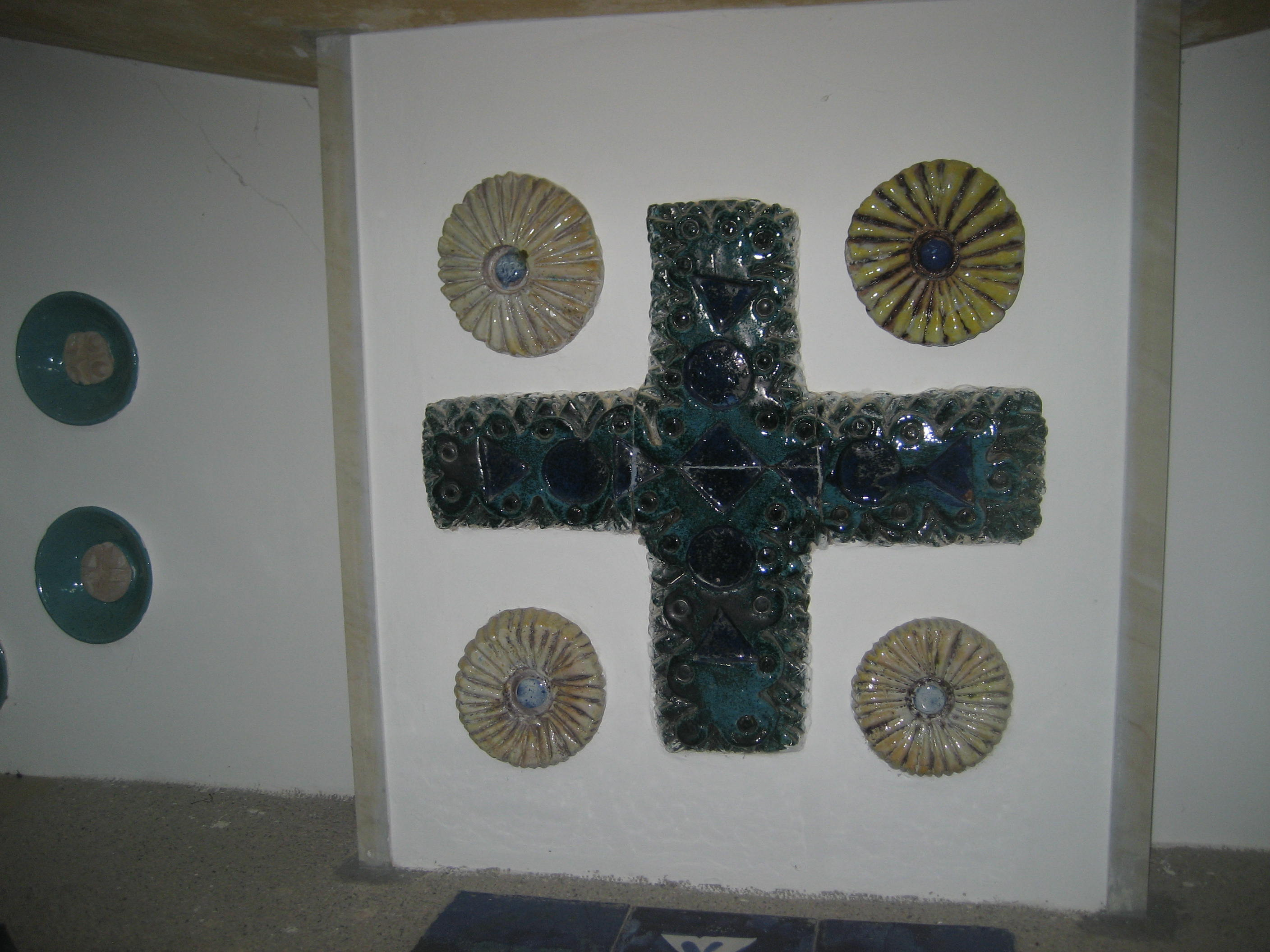 Particolari_chiesa_Natività